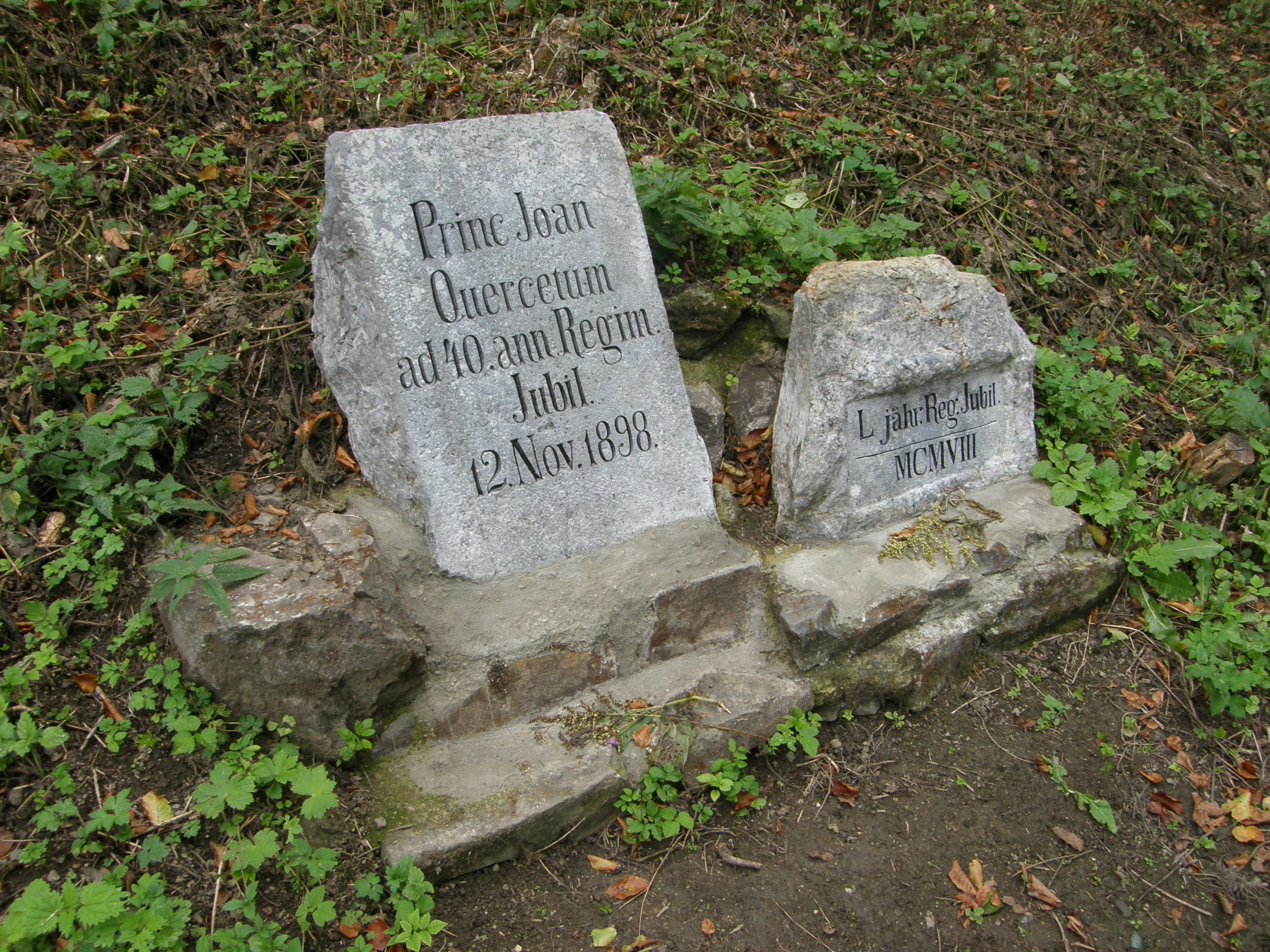 Lichtenštejnský kámen v Adamově